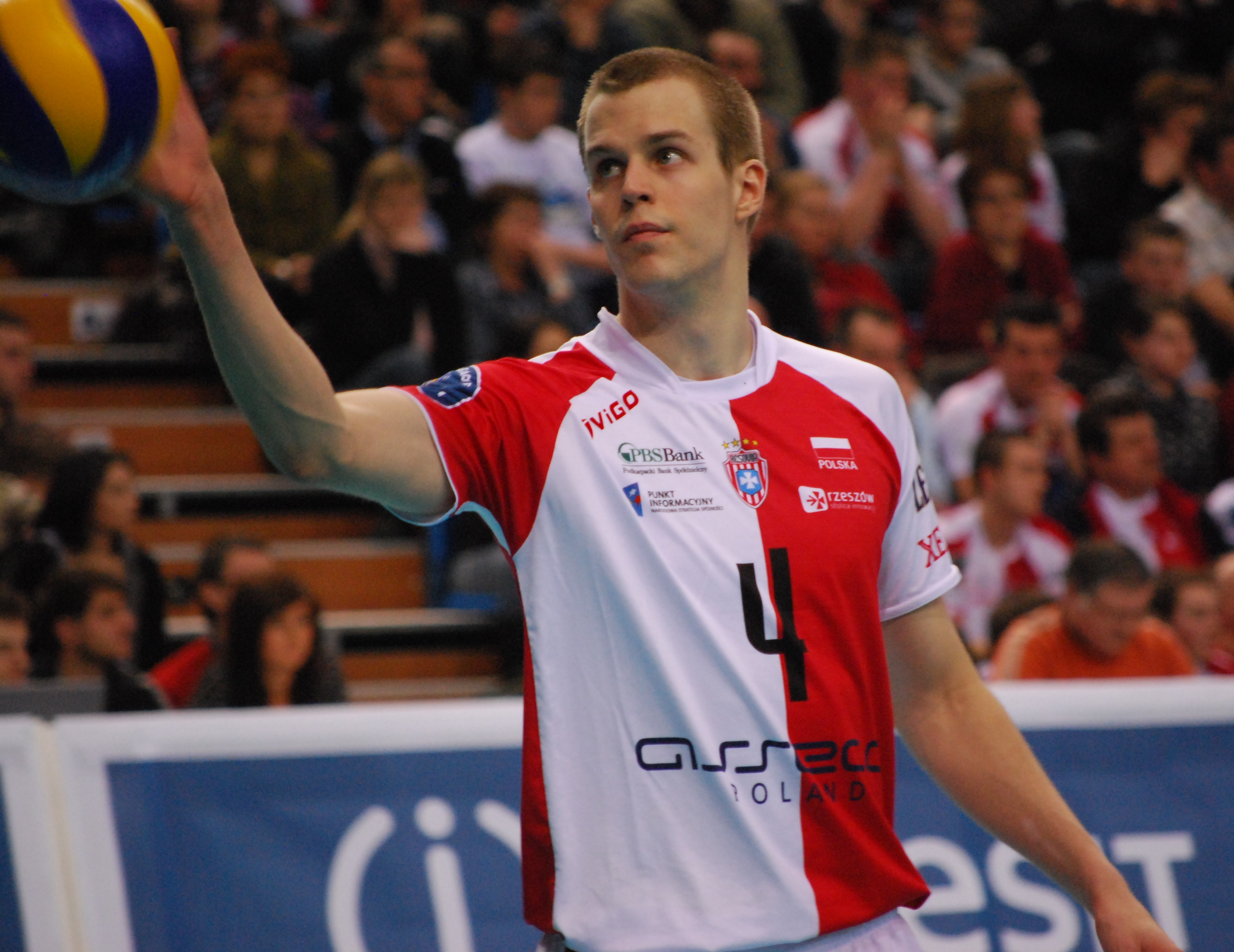 Mikko Oivanen - atakujący Asseco Resovi Rzeszów